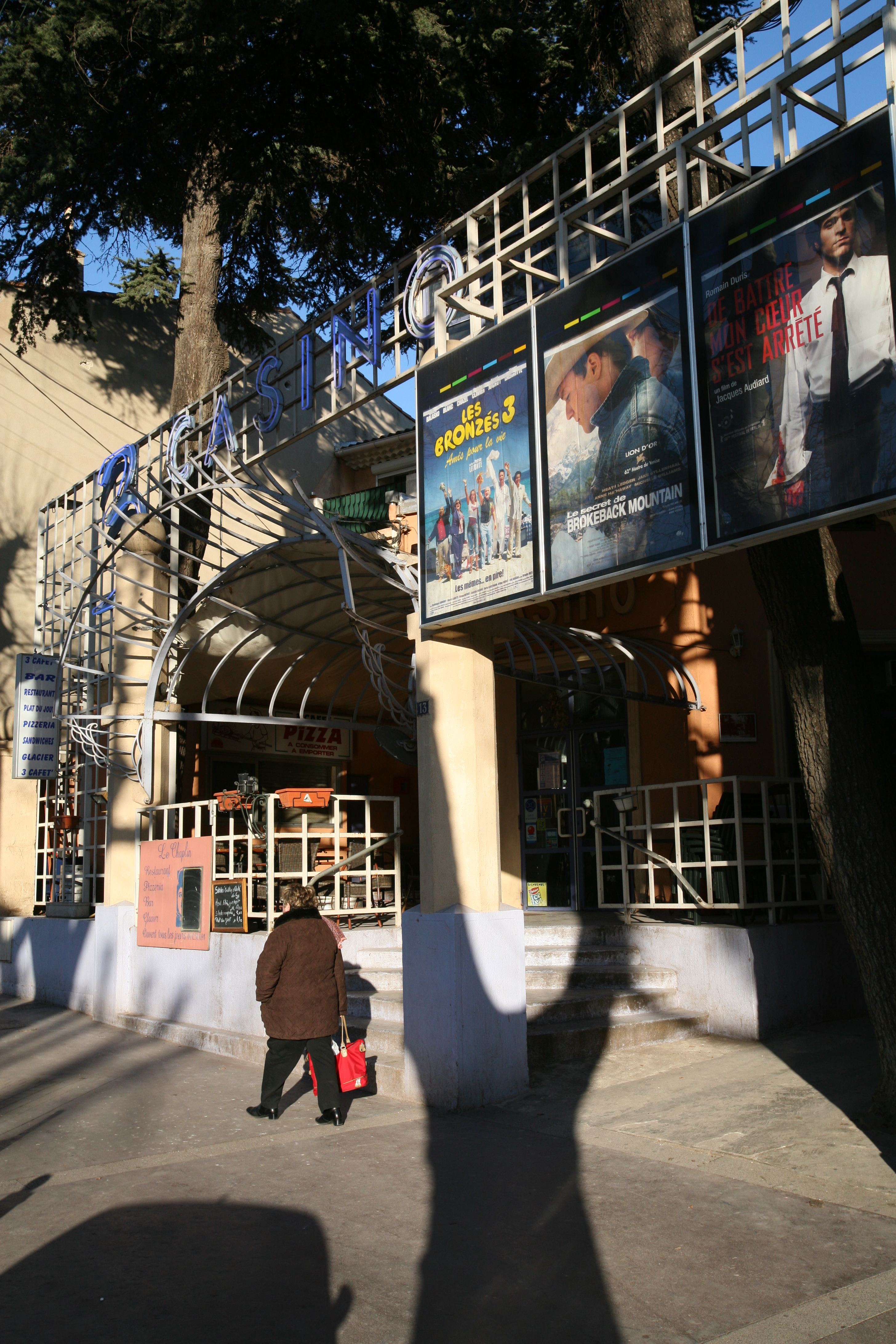 Gardanne, Bouches-du-Rhône, cinéma d' « Art et essai » « 3 Casinos » Photo personnelle prise le 1 mars 2006 Auteur : Oscar J. Marianez